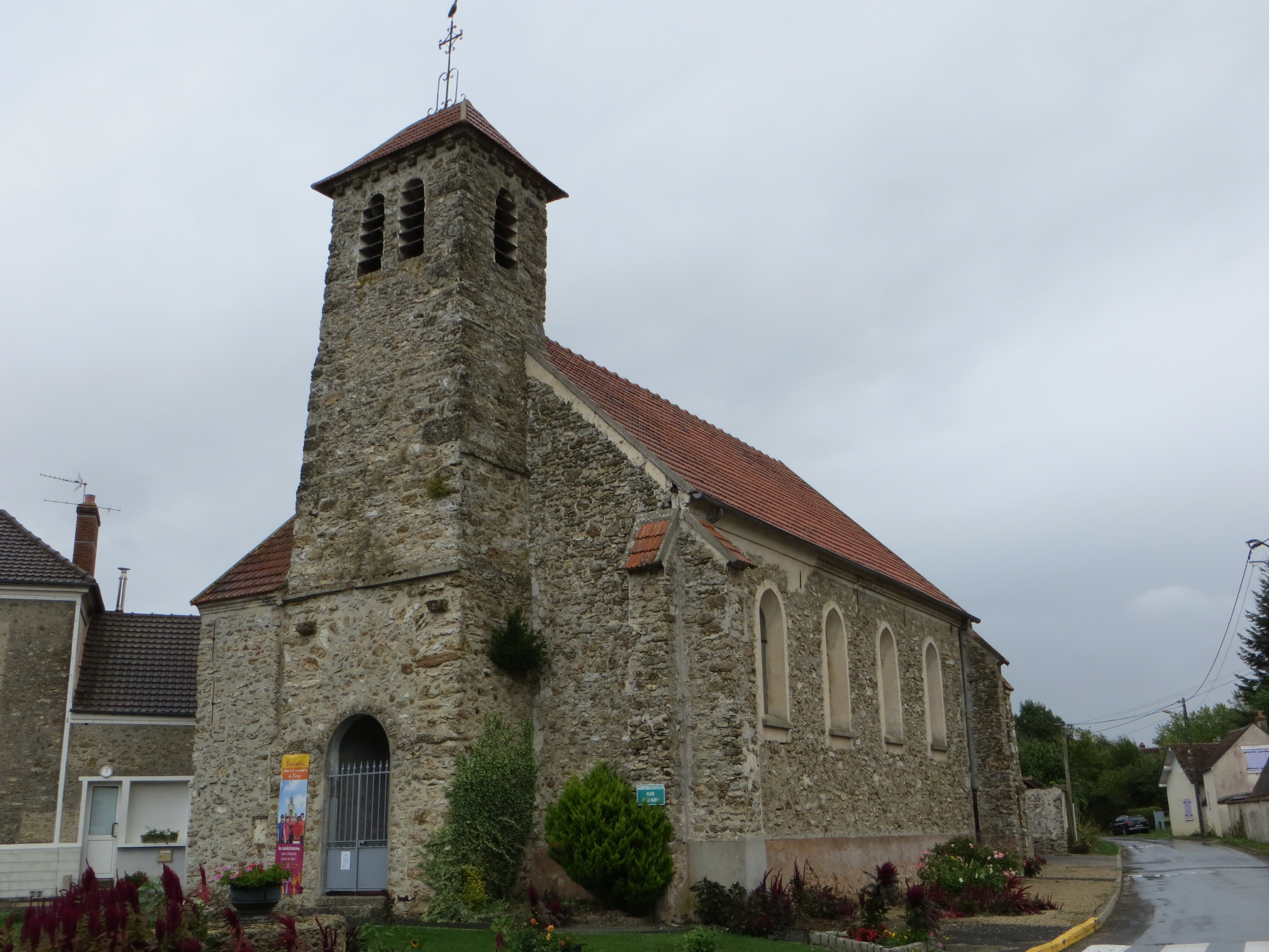 Vue de l'église